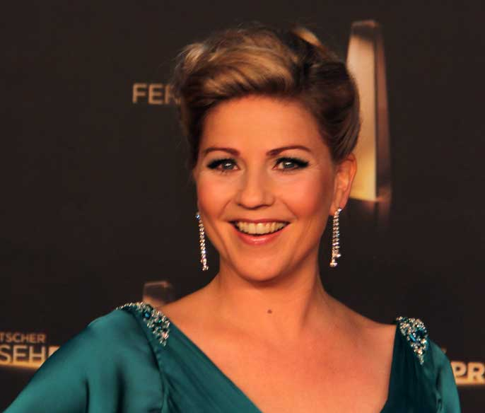 Aleksandra Bechtel beim Deutschen Fernsehpreis 2012